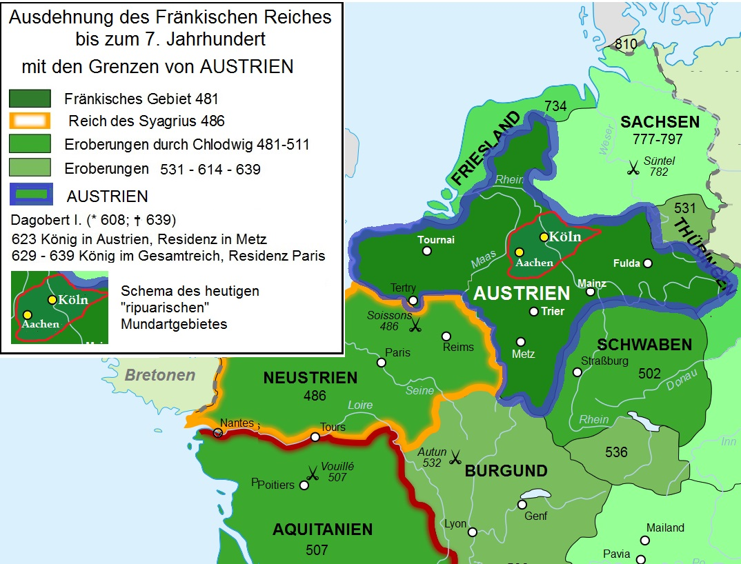 Reich des Frankenkönigs Dagobert I. mit Gebiet der Rheinfranken (Ripuarier) - Gesetzesveröffentlichung der Lex Ripuaria zur Zeit Dagoberts I